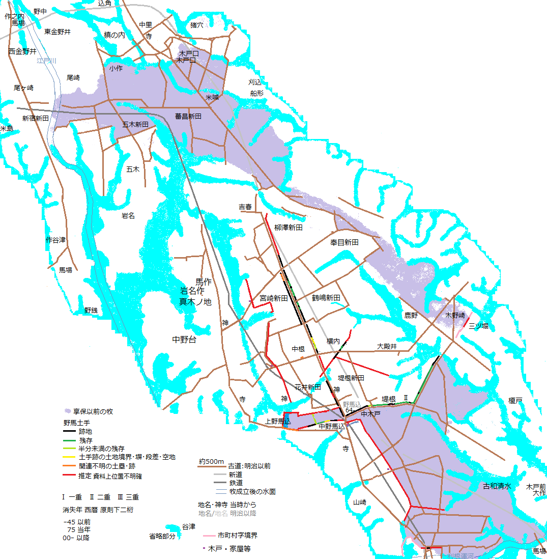 戦前の地形図を基に目視手書きで作成した図から作成した庄内牧野馬土手位置図。誤差が大きい。